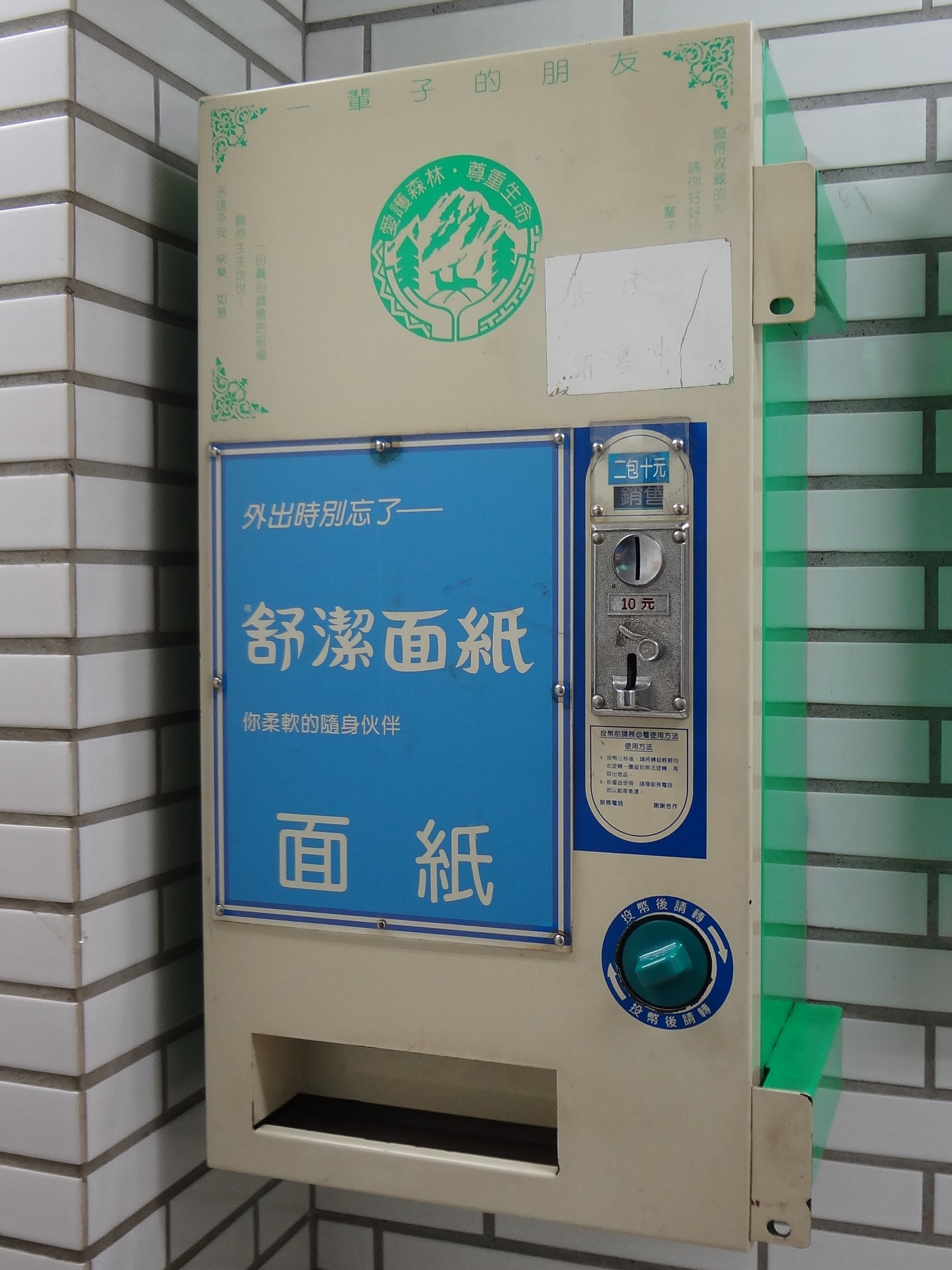 萬年商業大樓4樓男廁大門外設置的舒潔面紙免電力販賣機。